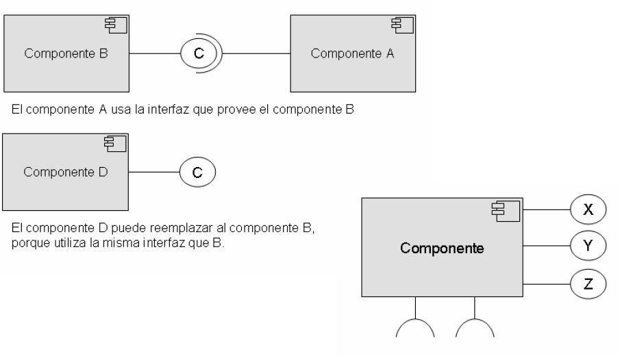 Ventajas de un diagrama de componentes